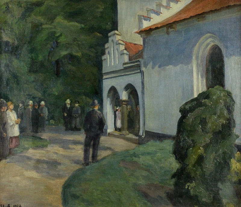 Gesellschaft vor Kapelle.